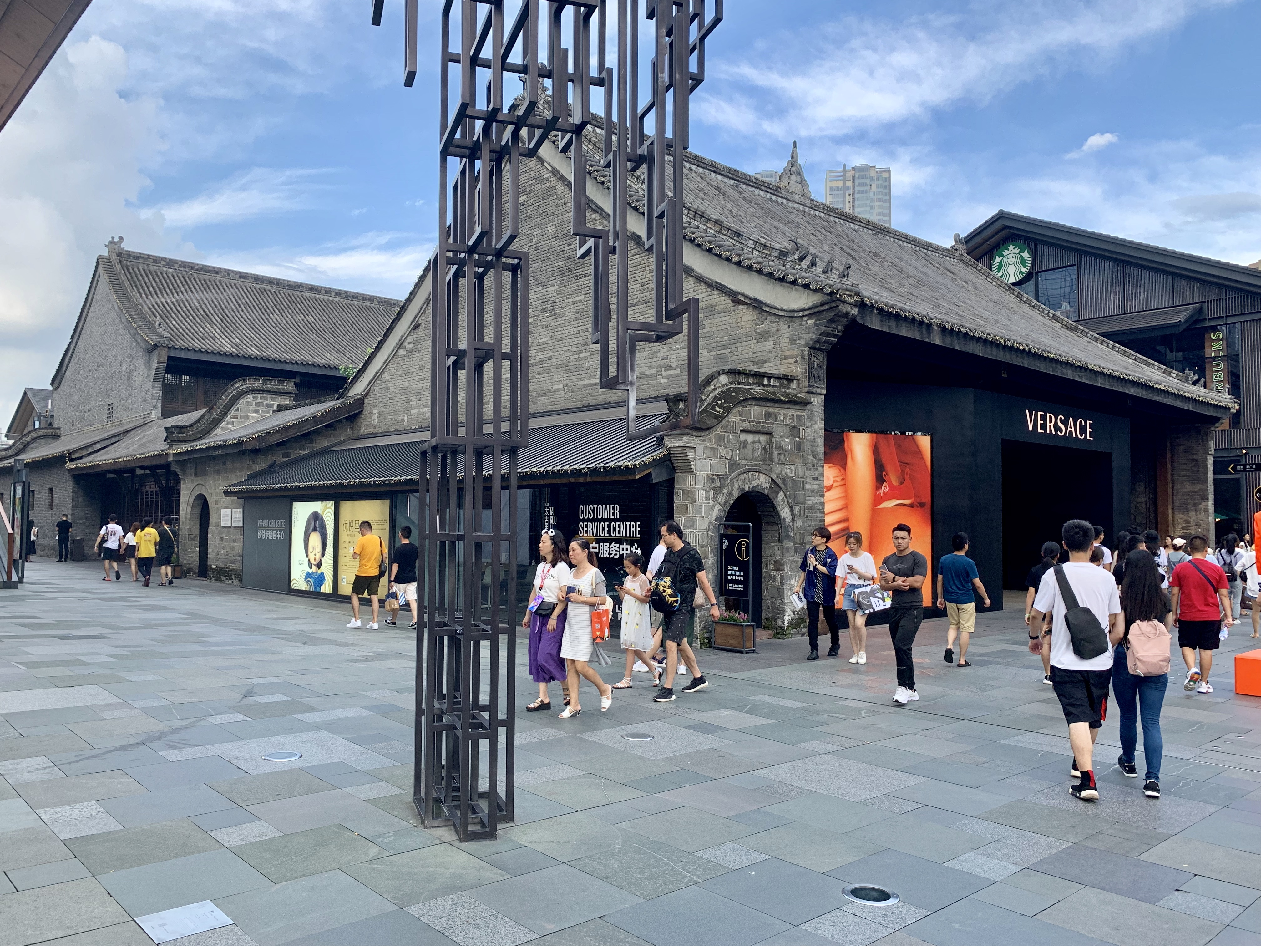 成都远洋太古里内广东会馆